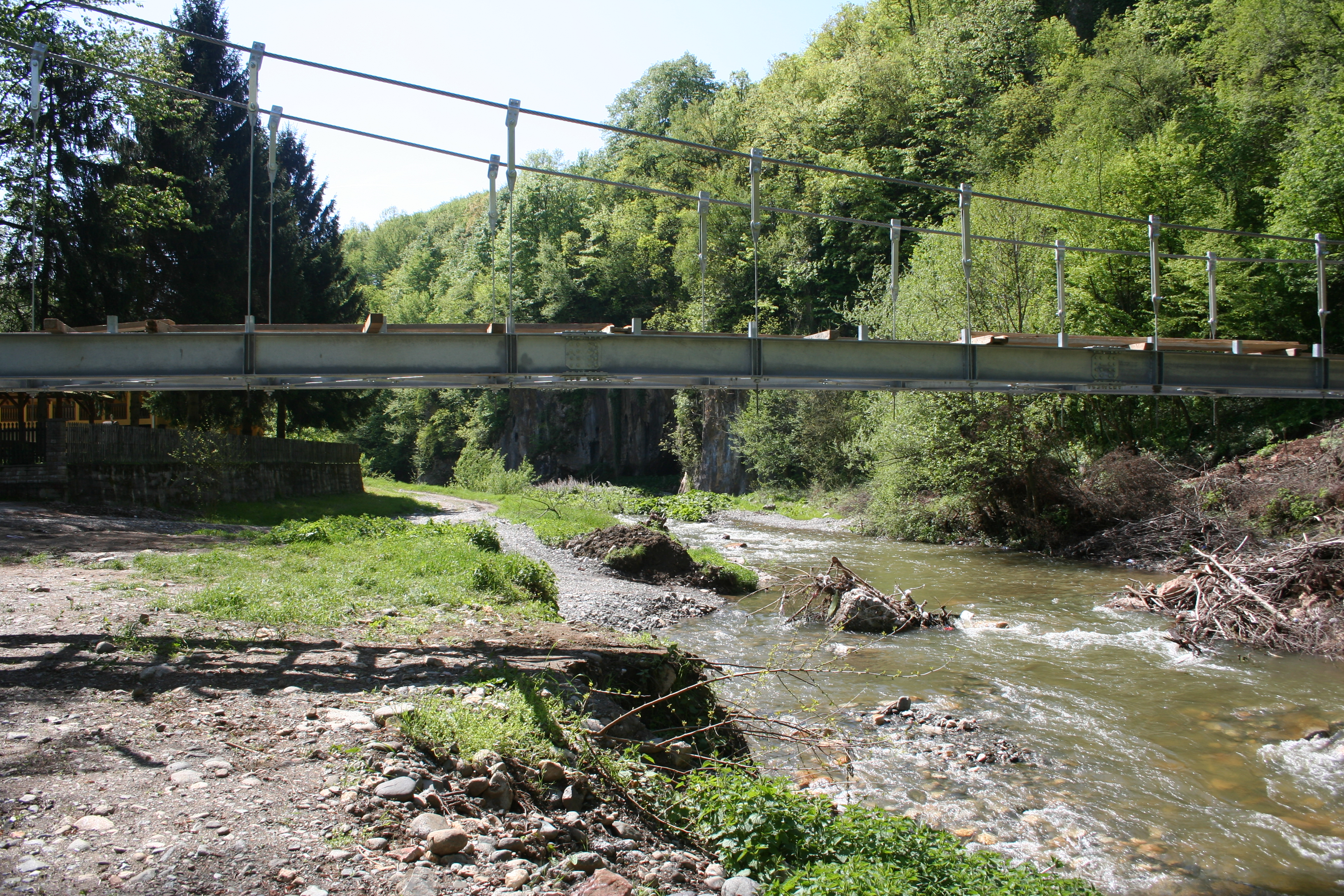 Spomenik prirode Ribnica Ово је фотографија заштићеног природног добра у Србији под шифром: СП206 This is a a photo of a natural area in Serbia with ID: СП206